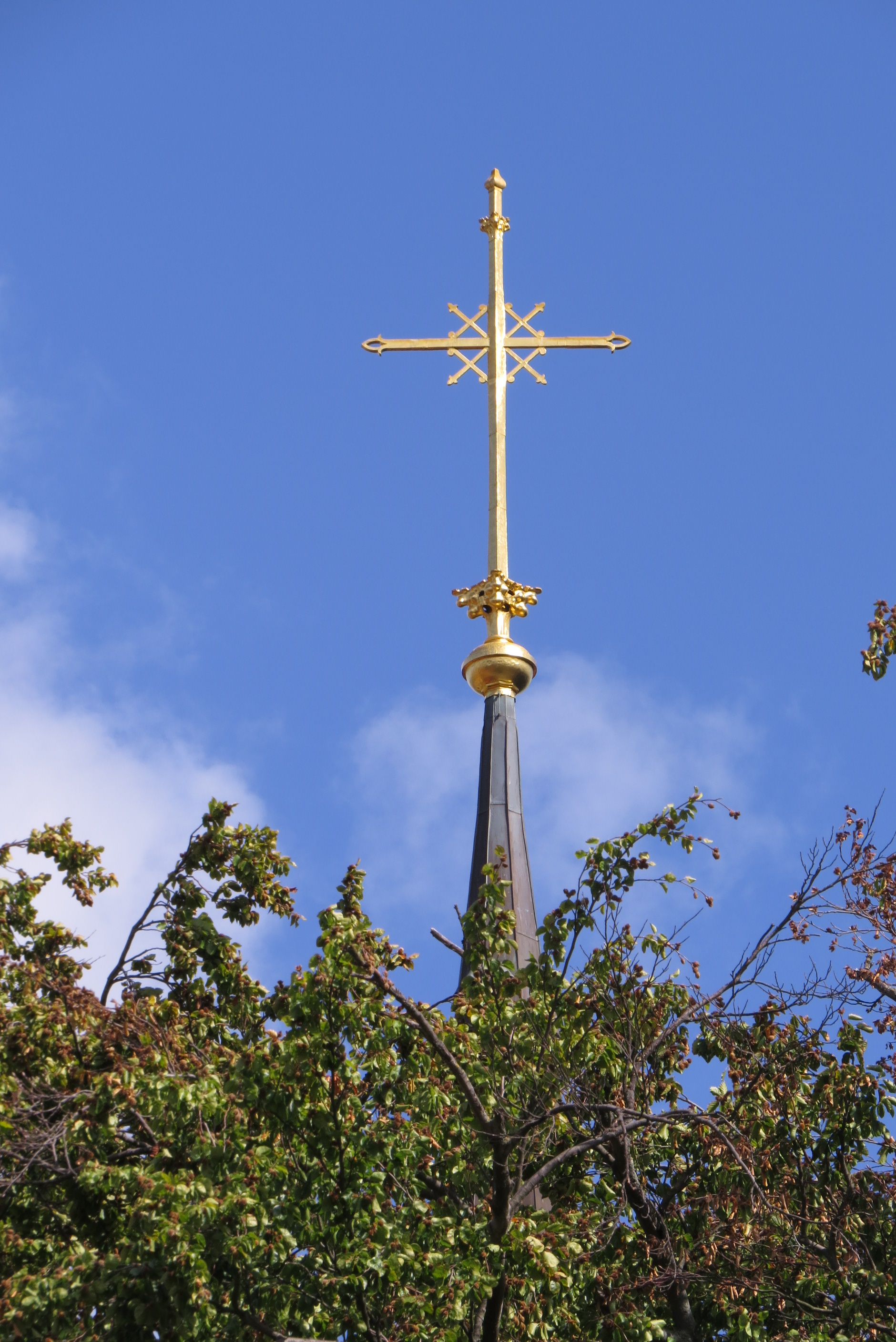 Kirche St. Georg, Berlin-Pankow, Turmspitze mit Kugel und Kreuz